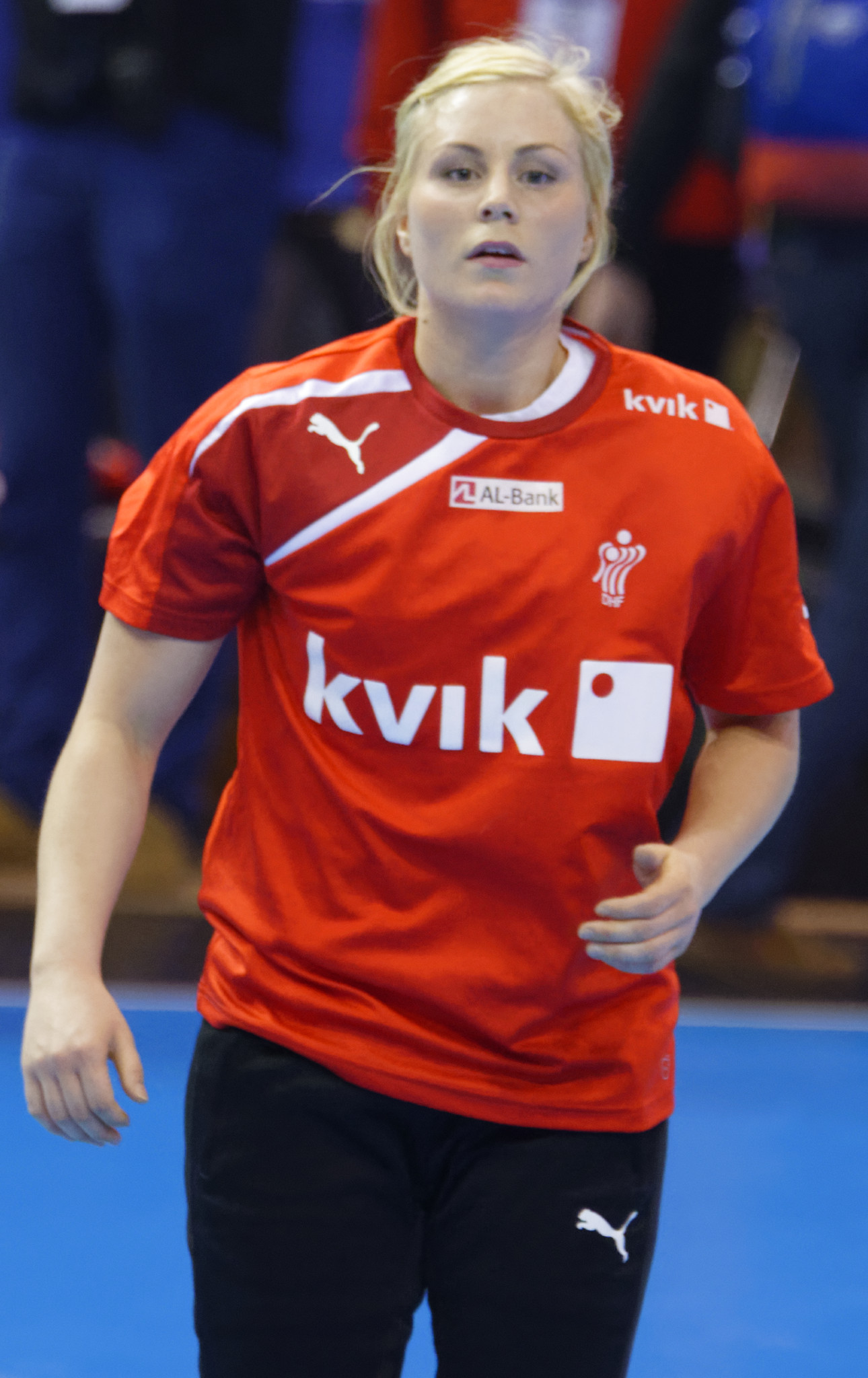 Rencontre France - Danemark lors de la Golden League. A Dijon, le 19 mars 2015.